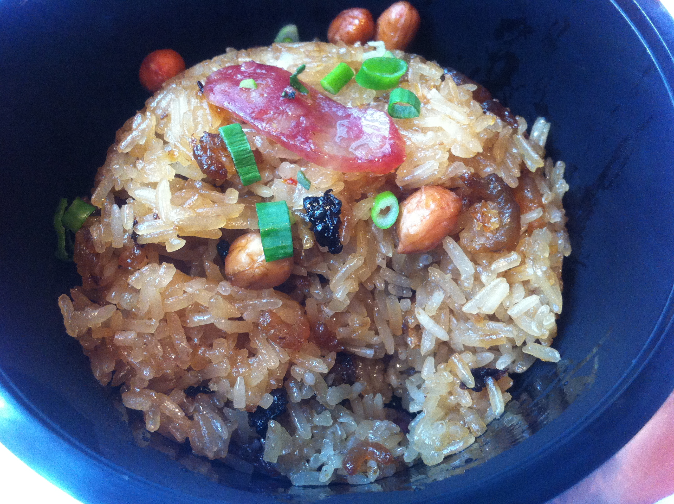 中文（香港）: 大快活 下午茶 糯米飯